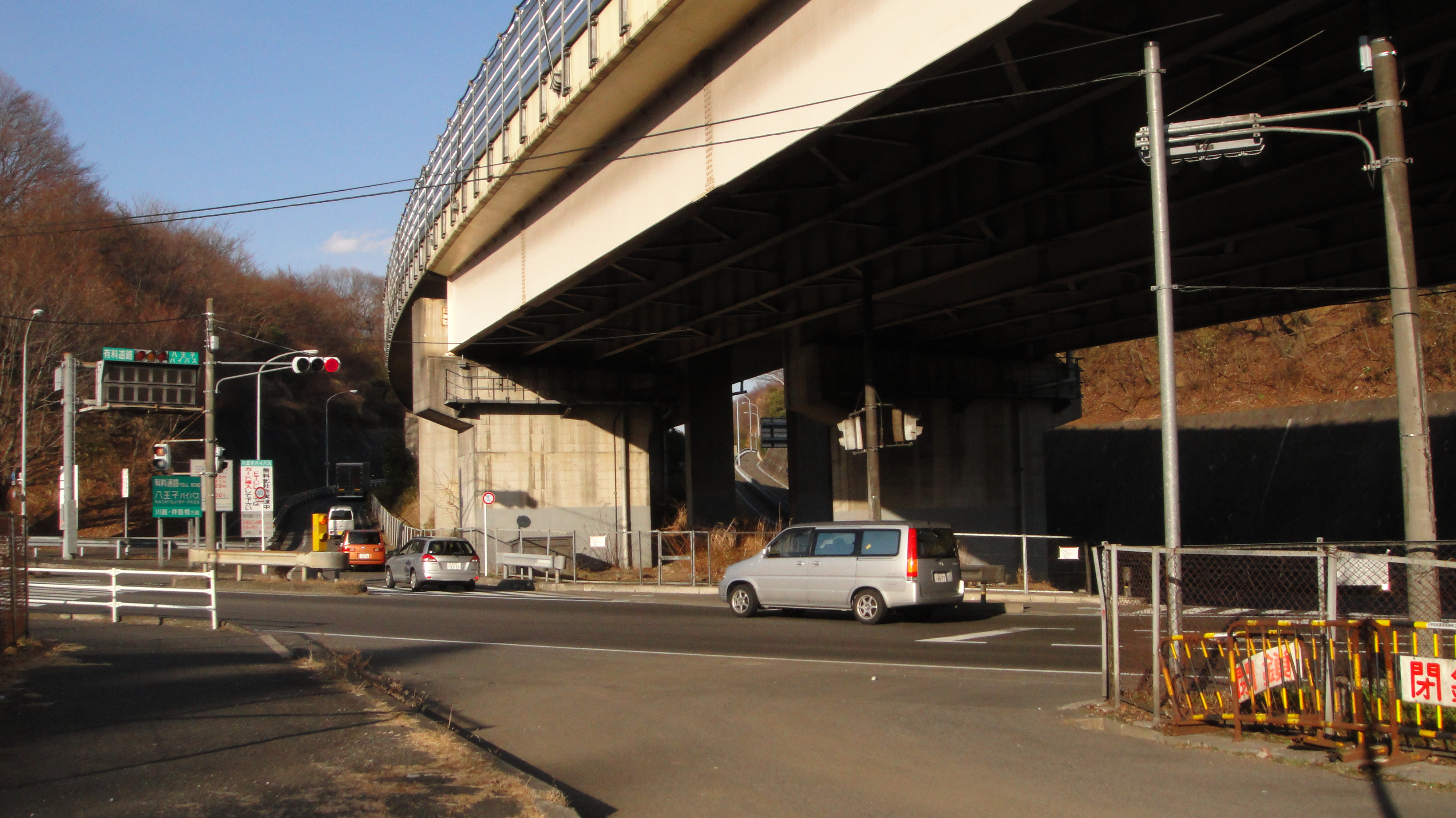 八王子バイパス『鑓水IC』